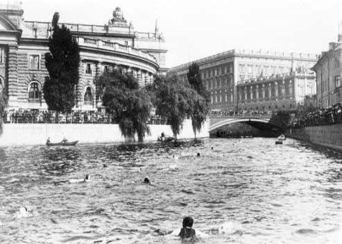 Strömsimningen i Stallkanalen mellan Riksdagshuset och Stockholms slott